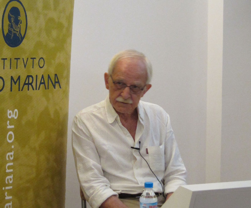 Antonio Escohotado durante una conferencia en Madrid en 2013